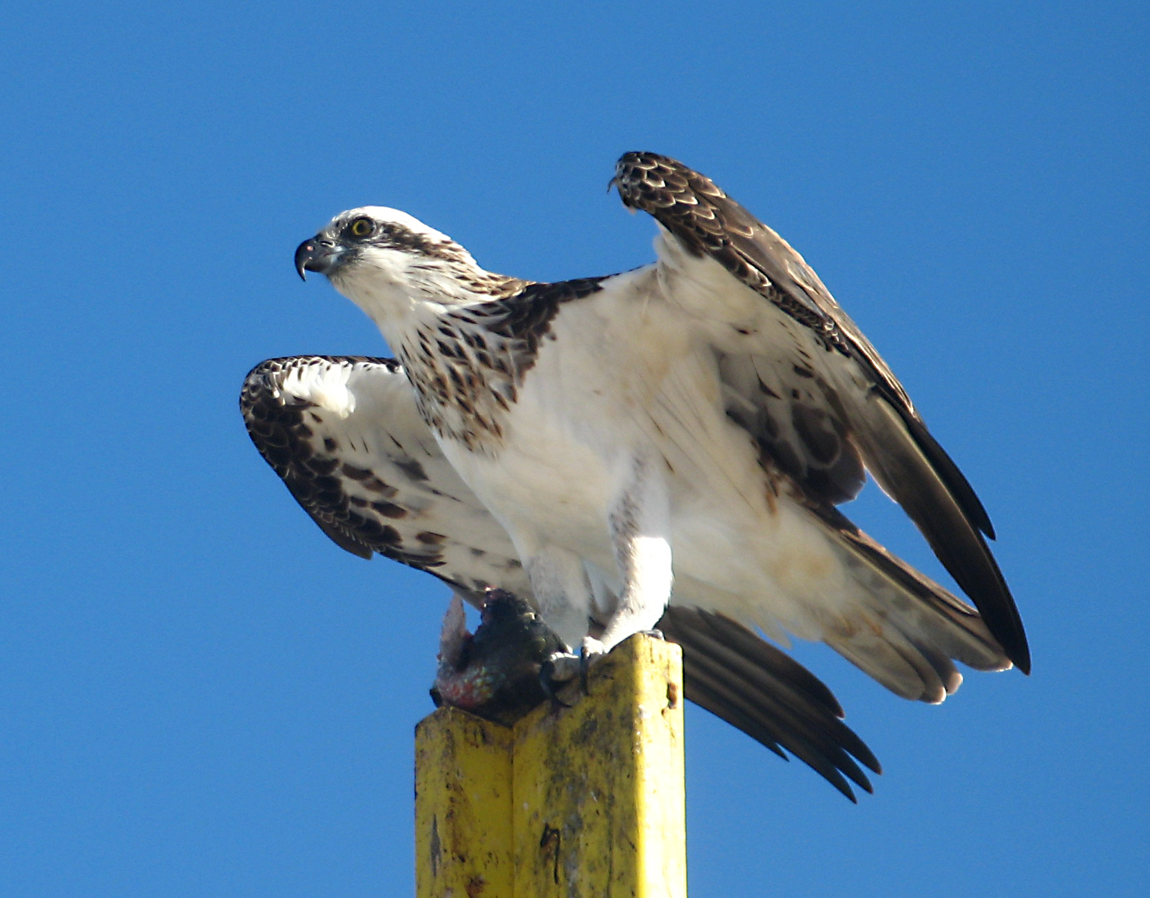 Pandion haliaetus